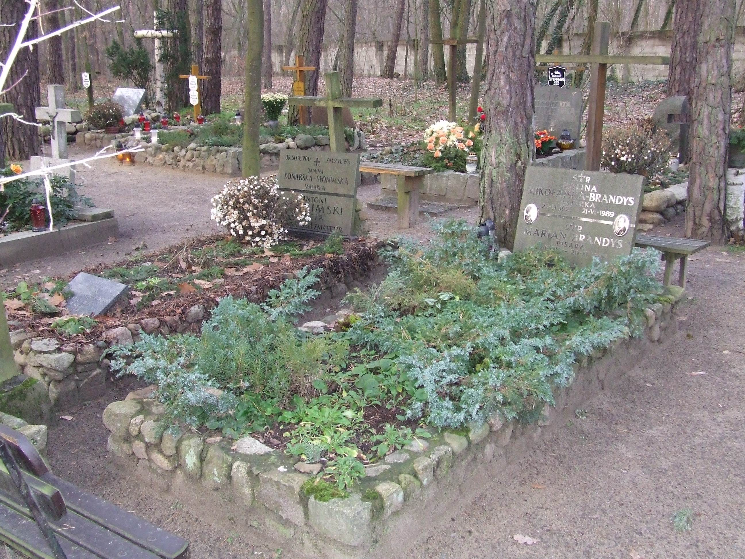 Grób Brandysów, Cmentarz leśny, Laski